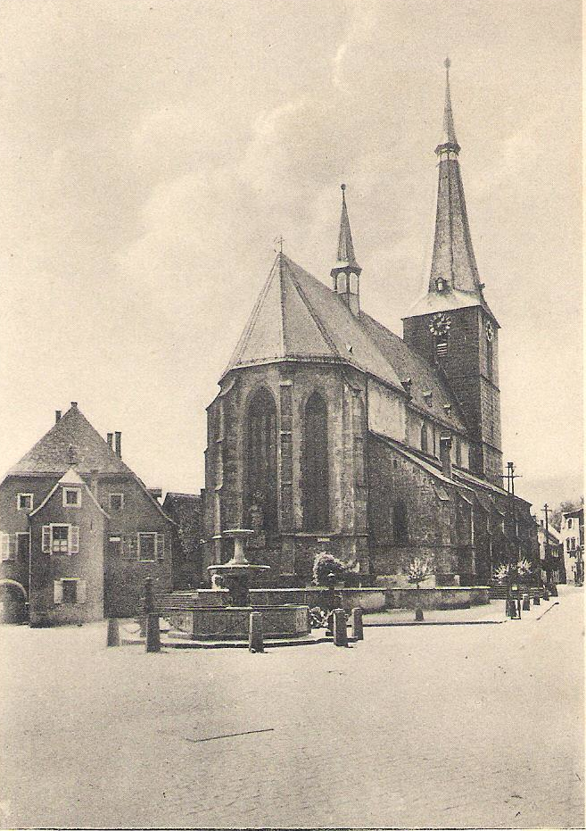 Marktplatz Deidesheim, links das Rathaus, in der Mitte die Ulrichskirche, davon der Andreasbrunnen